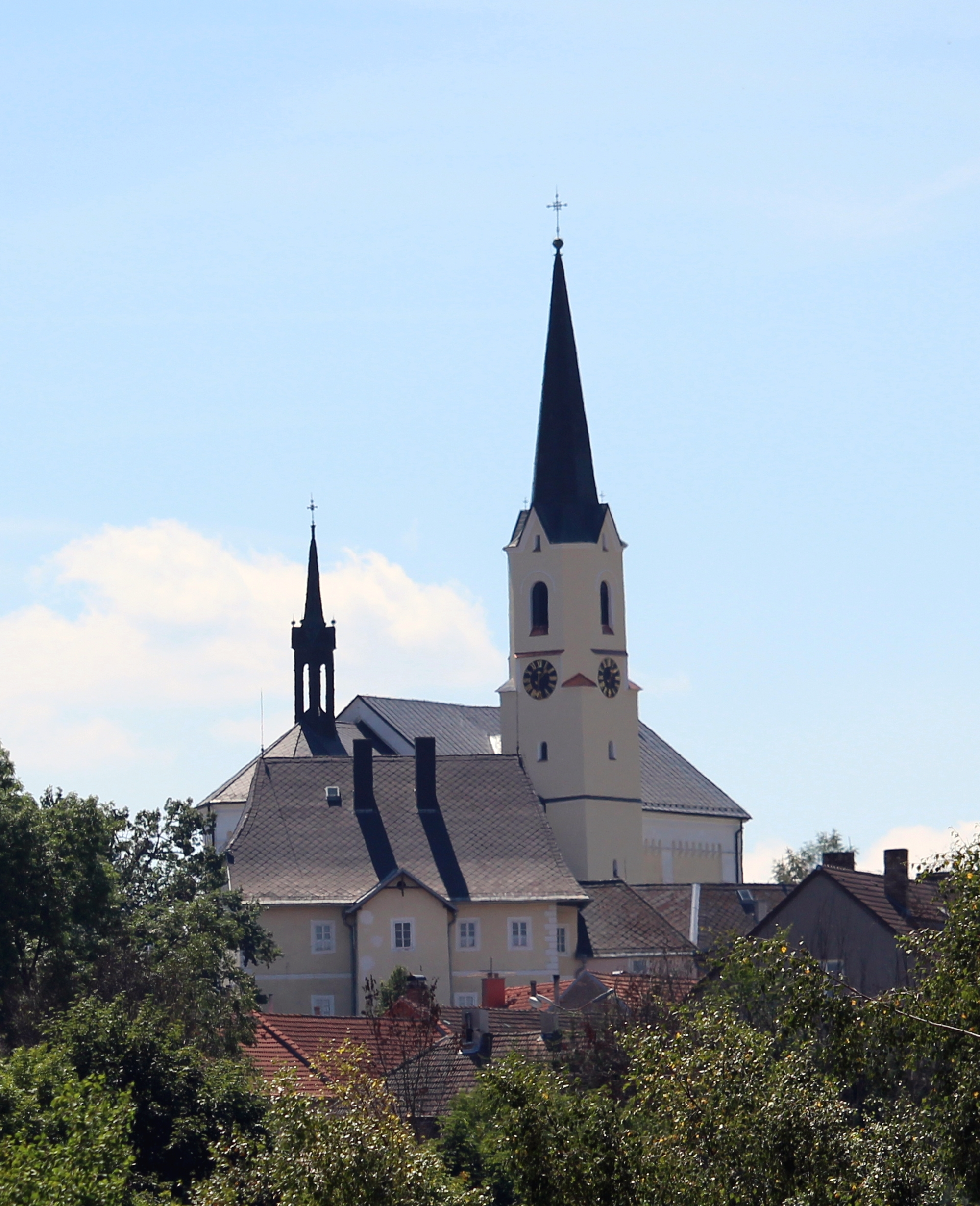 Pfarrkirche St Jakob in Světlík (Tschechien), ehemals Kirchschlag